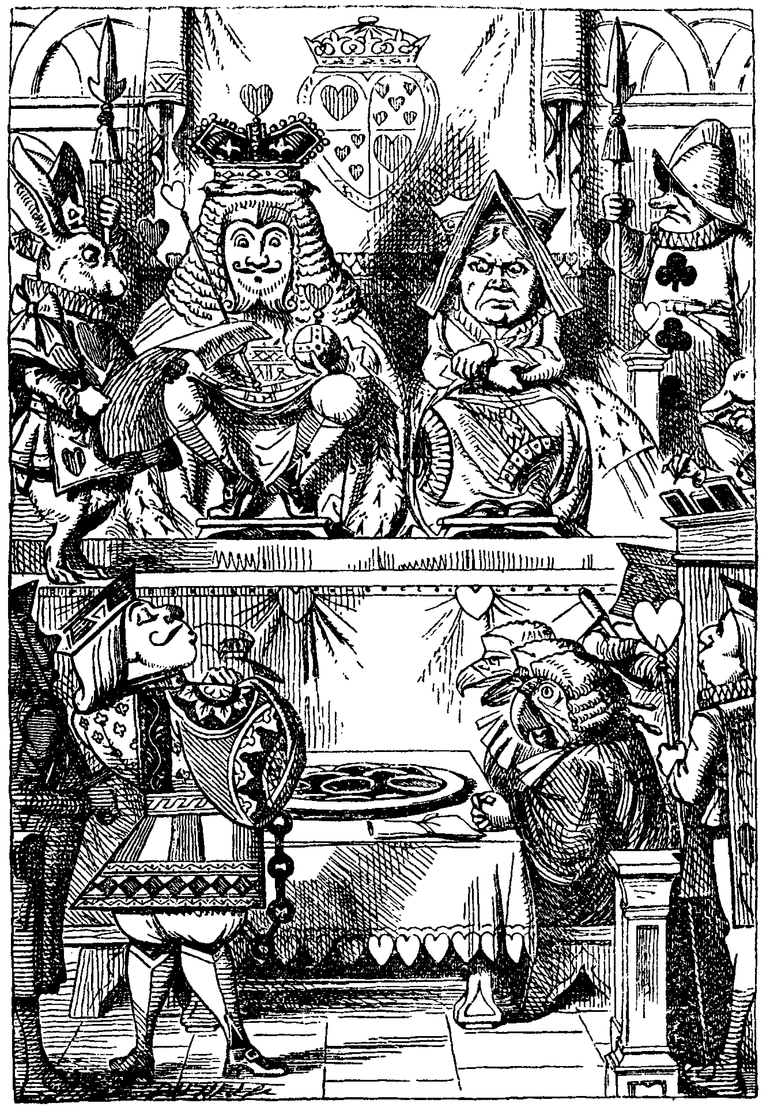 Alice’s Abenteuer im Wunderland Übersetzer: Antonie Zimmermann Orginal Titel: Alice's Adventures in Wonderland Illustrationen: John Tenniel